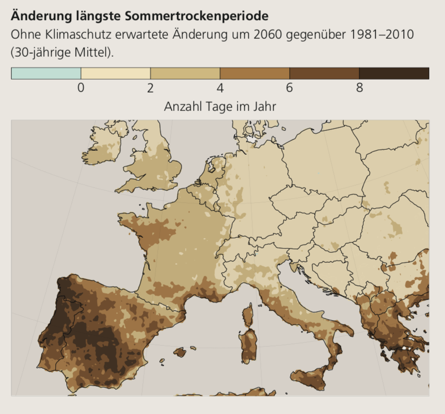 Klima in Europa. Sommertrockenperiode. NCCS (Hrsg.) 2018: CH2018 – Klimaszenarien für die Schweiz. National Centre for Climate Services, Zürich.